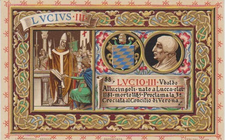 Tutto Gratis (in public domaain)